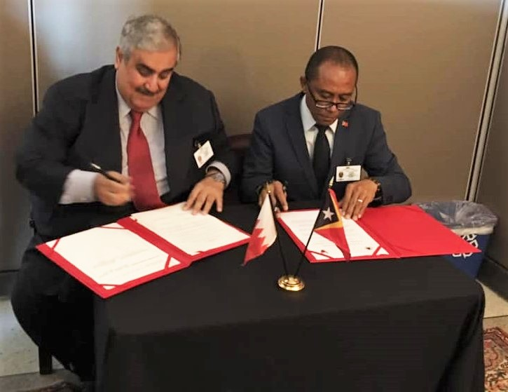 Khalid Bin Ahmed Khalifa und Dionísio Babo Soares unterzeichnen die Aufnahme diplomatischer Beziehungen zwischen Bahrain und Osttimor.